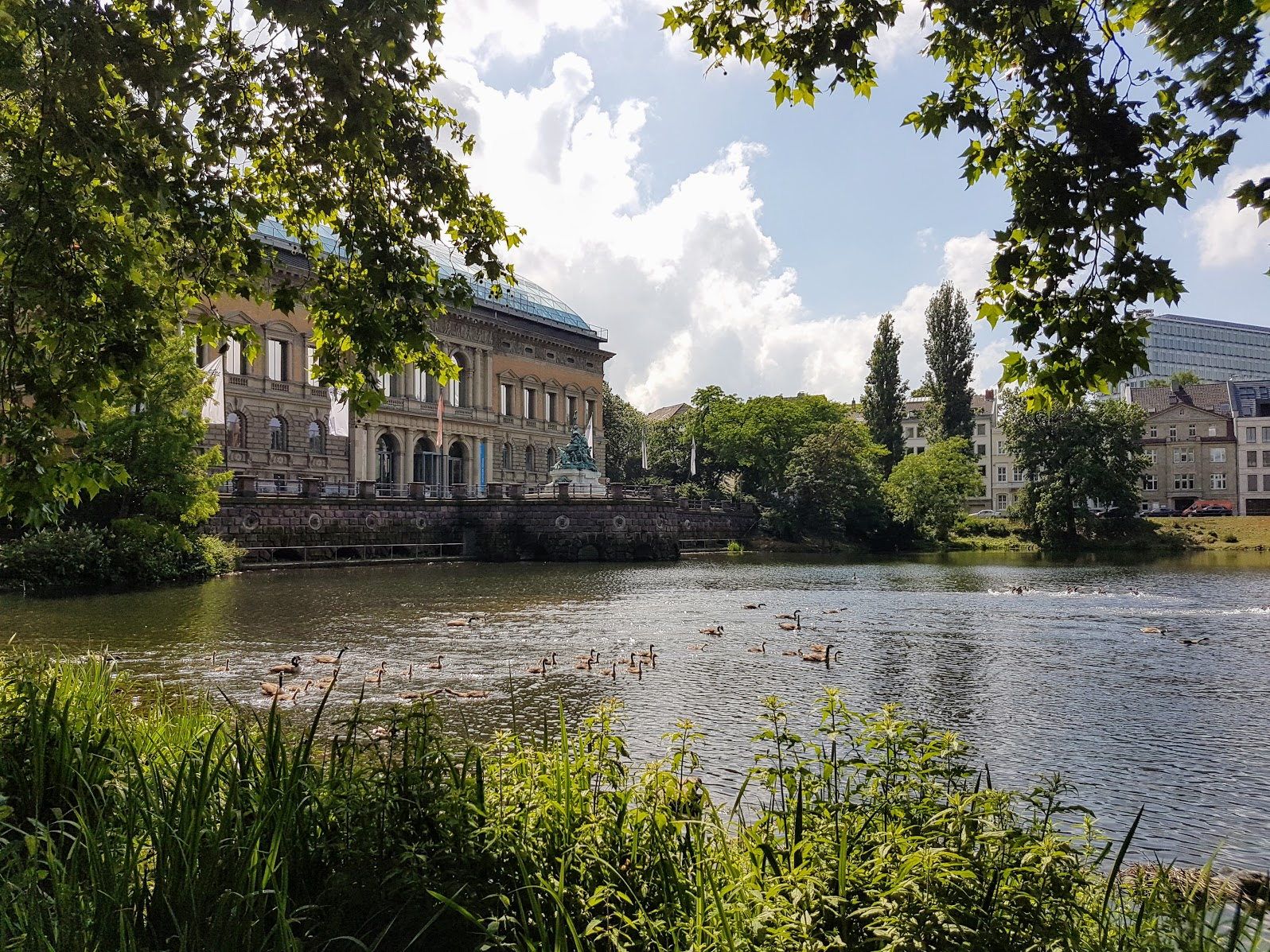 Ständehaus mit Wasseranlage